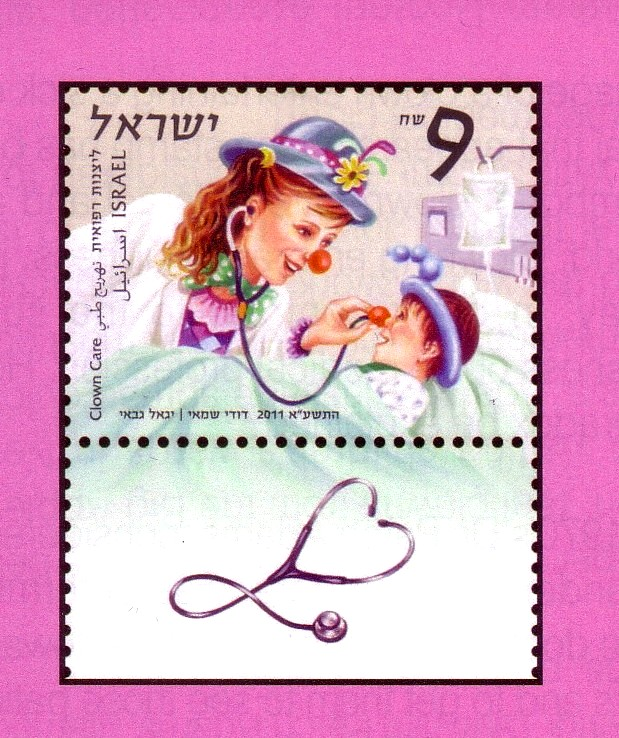 בול לדואר ישראל